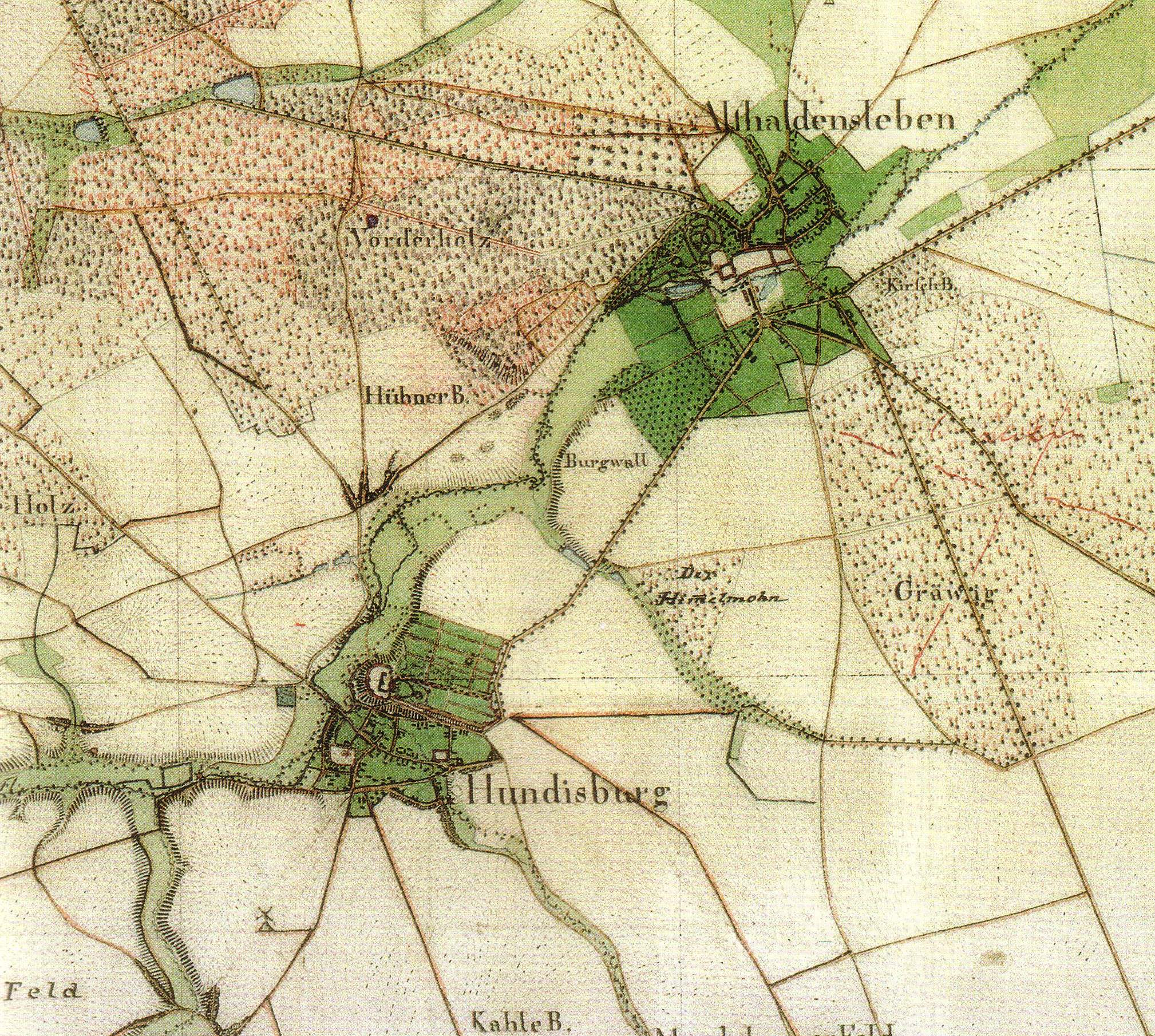 Messtischblatt von 1823: Hundisburg und Althaldensleben, Sachsen-Anhalt